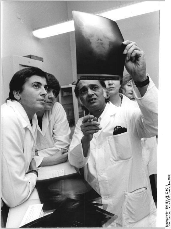 Berlin, Charité, Beratung "ADN-ZB Reiche 22.11.79- Berlin: Informationen für die Diagnose- OÄ Dr. Charlotte Opitz, Kieferorthopädin, (links) Dr. päd. Marianne Hochmuth, Sprachheilpädagogin, und Dr. Dr. Devram Shetty, Kieferchirurg, Mitarbeiter der Arbeitsgruppe ""Rehabilitation angeborener Anomalien im Kiefer-Gesichtsbereich"" an der Klinik für Kiefer- und Gesichtschirurgie der Berliner Charité besprechen einen Krankheitsfall."